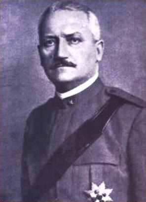 Enrico Caviglia (1862 – 1945) olasz tábornok és az első világháborút követően politikusként az Olasz Királyság hadügyminisztere volt